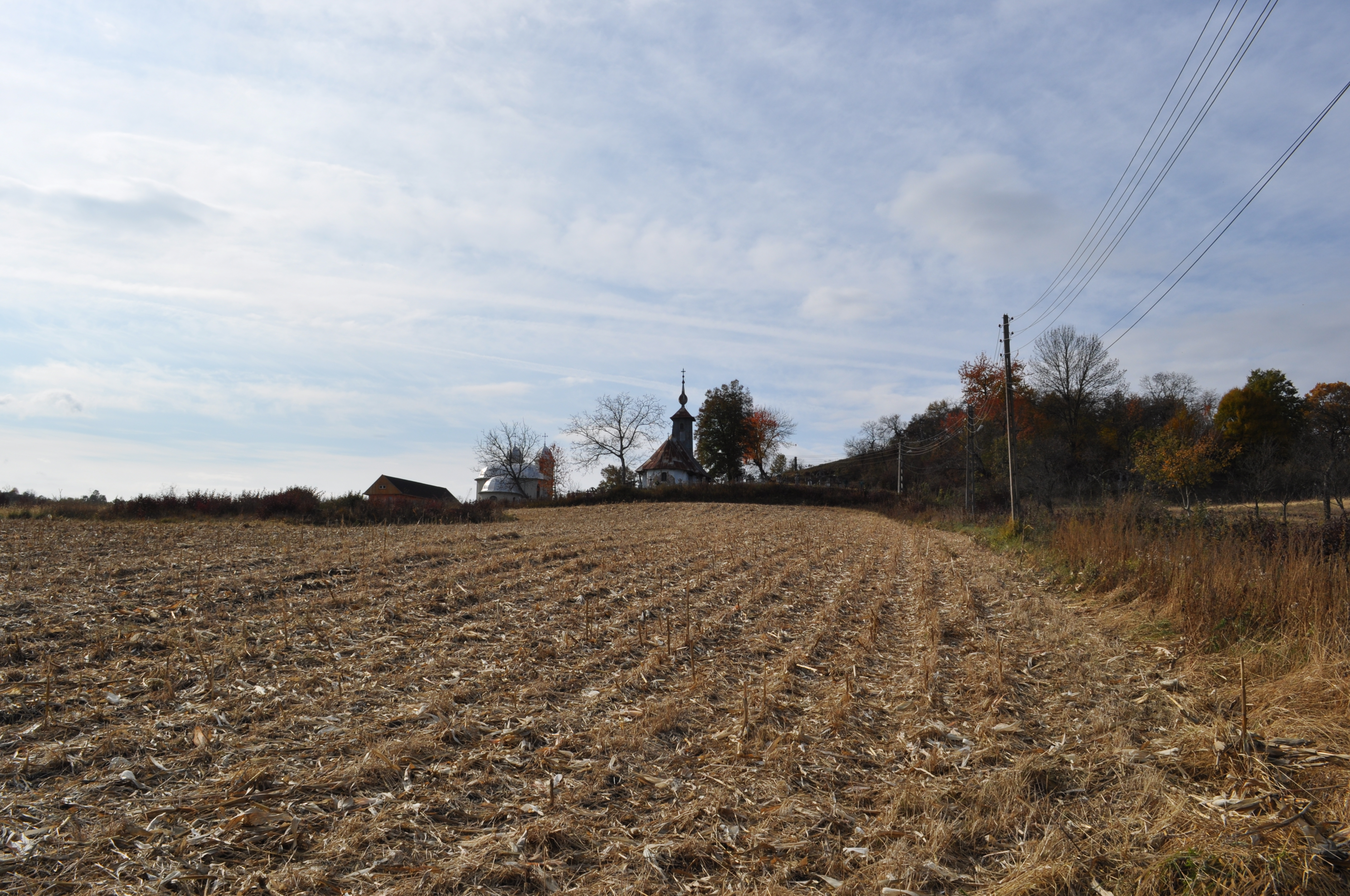 Biserica de lemn „Nașterea Maicii Domnului” din Săucani, județul Bihor